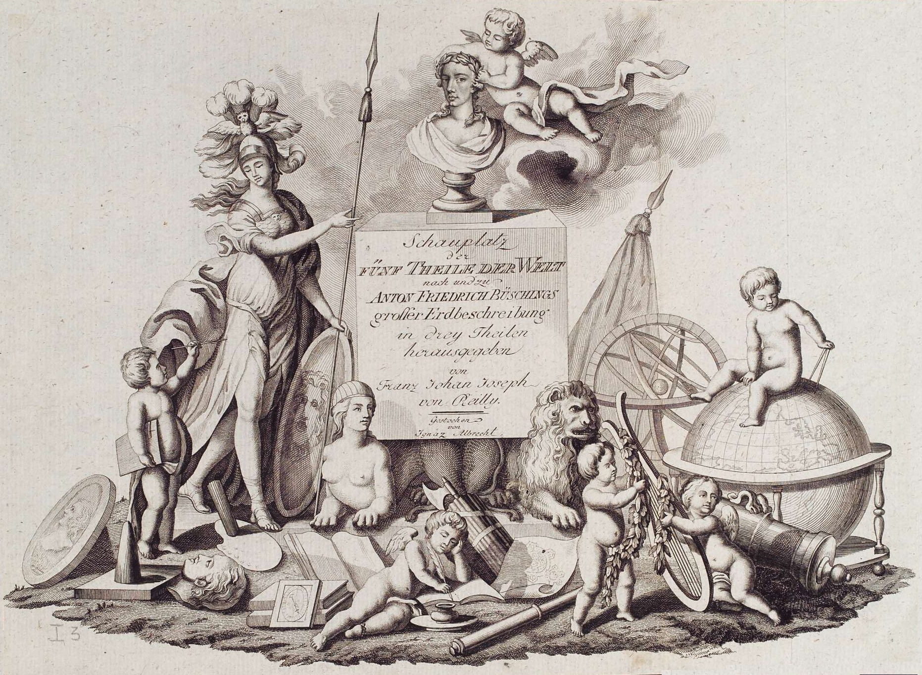 Schauplatz der fünf Theile der Welt nach und zu Anton Friedrich Büschings grosser Erdbeschreibung in drey Theilen herausgegeben von Franz Johan Joseph von Reilly. Gestochen von Ignaz Albrecht. Titelblatt. Kupferstich